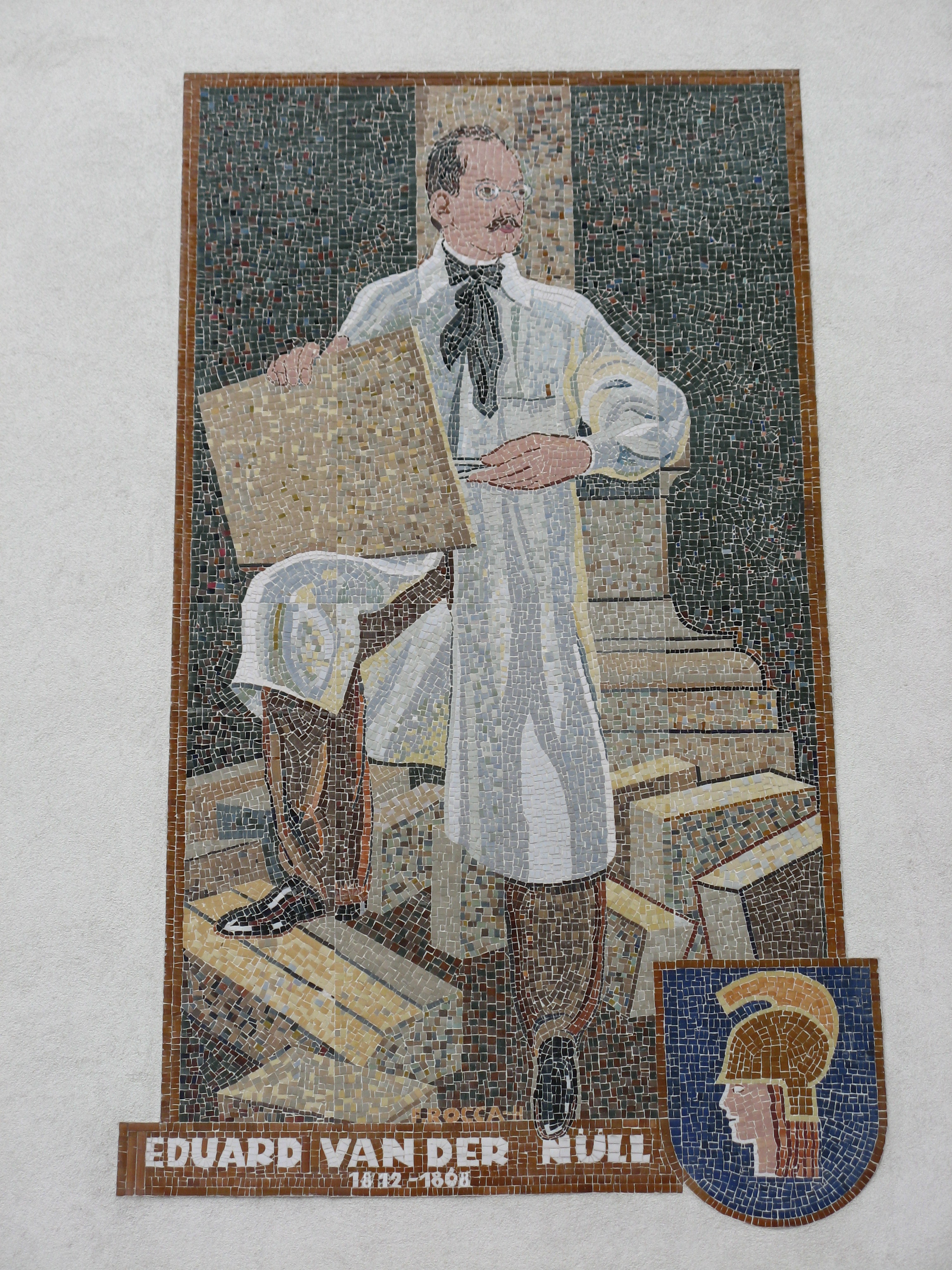 Mosaik Eduard van der Nüll, Davidgasse 35, Wien-Favoriten